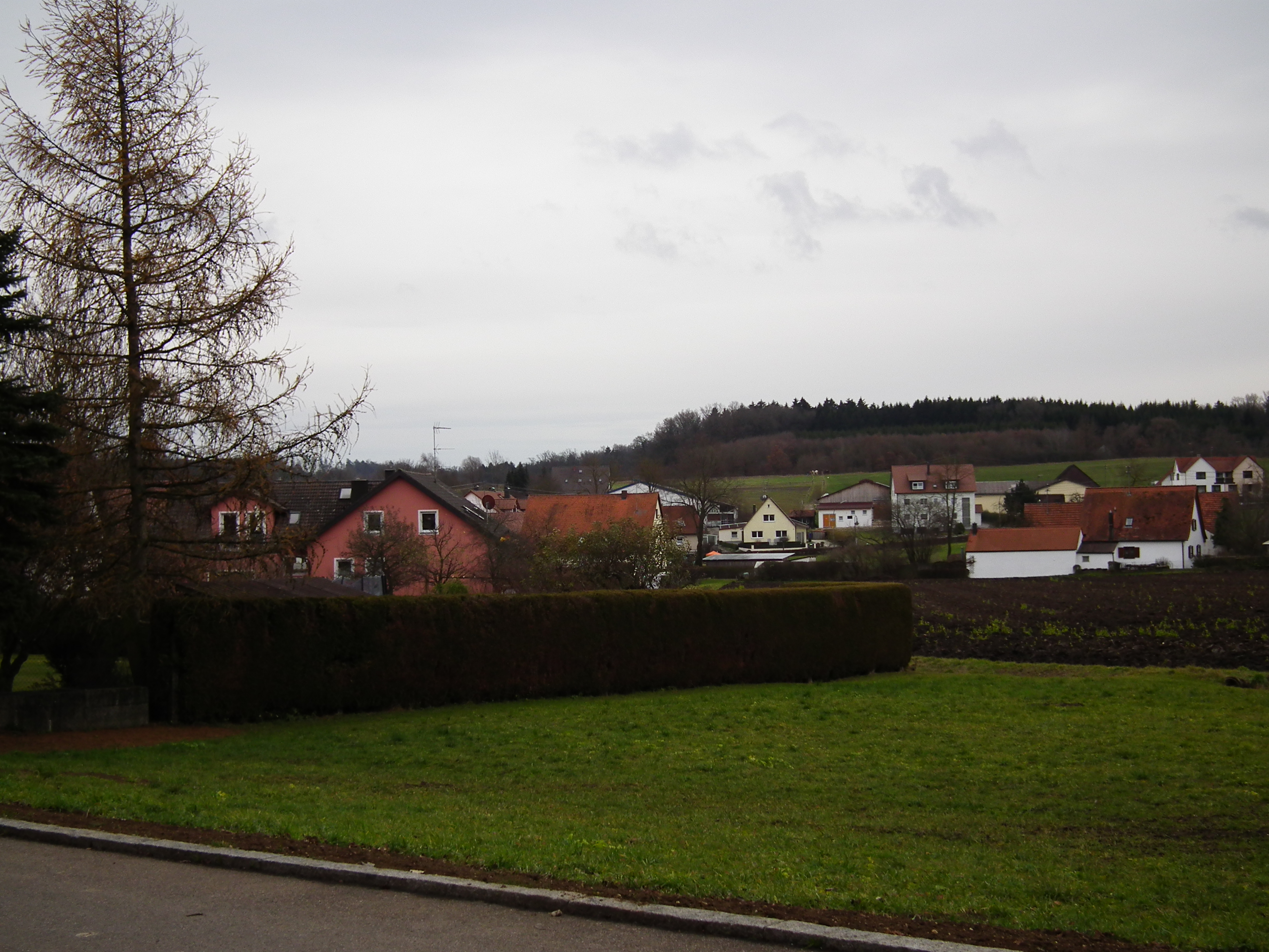 Otting (Bayern, Deutschland)